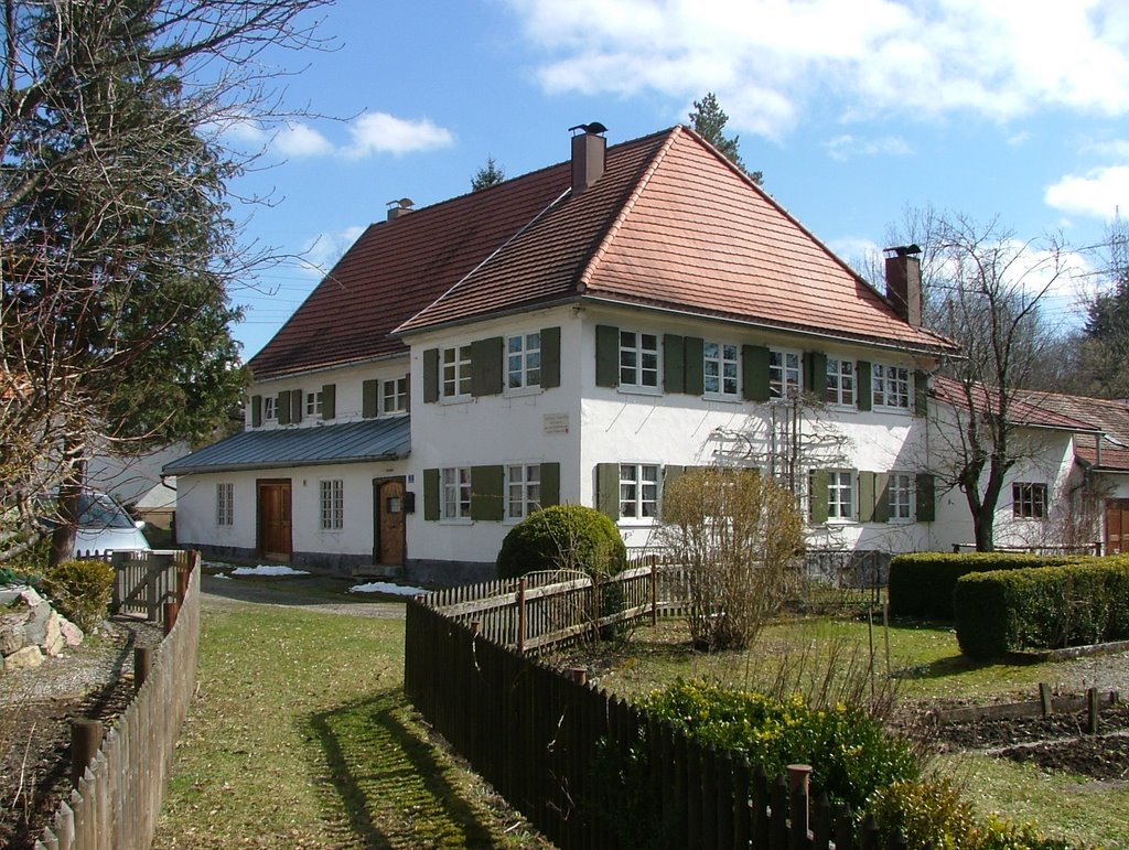 Stielings